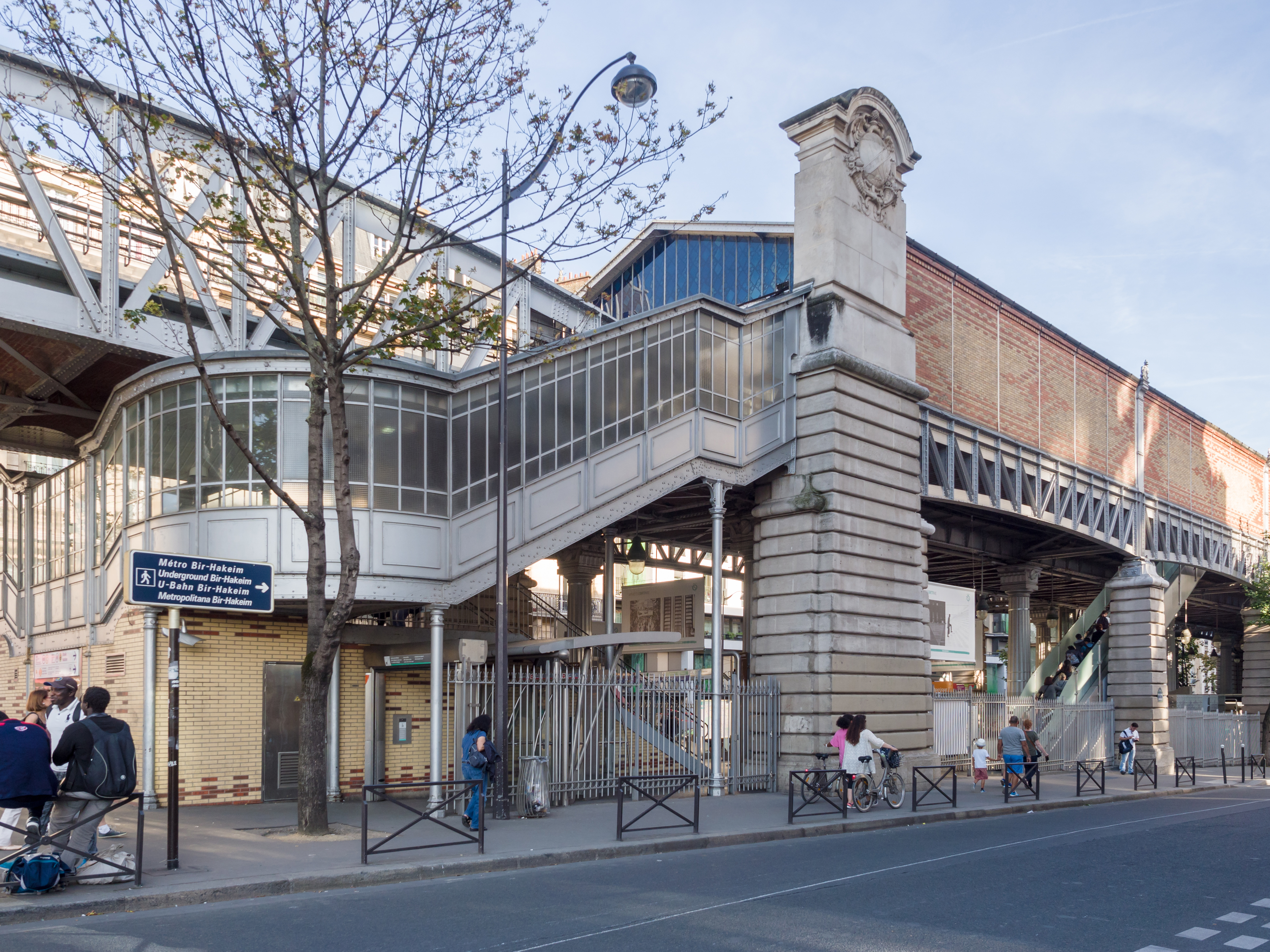 Metro Bir-Hakeim, Paris, France.